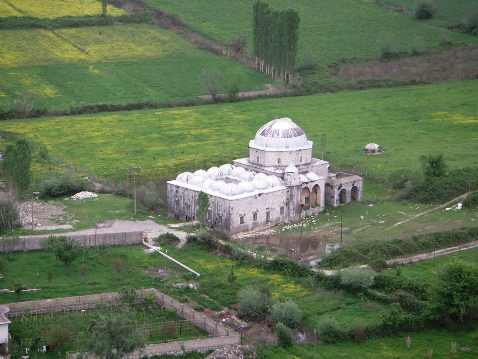 Mezquita de Plomo vista desde el castillo de Rozafa.